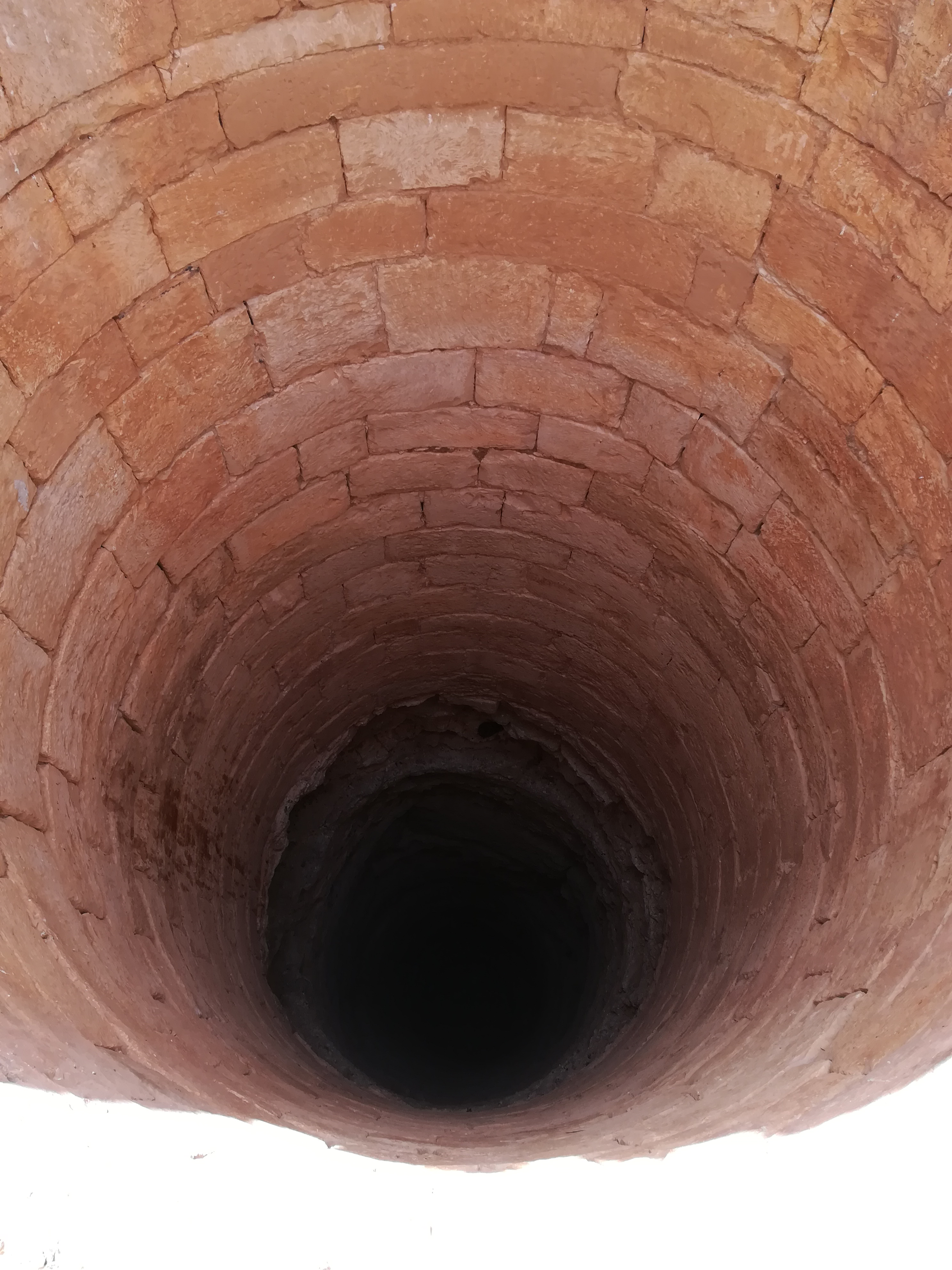 Puits dans le désert de Jordanie.